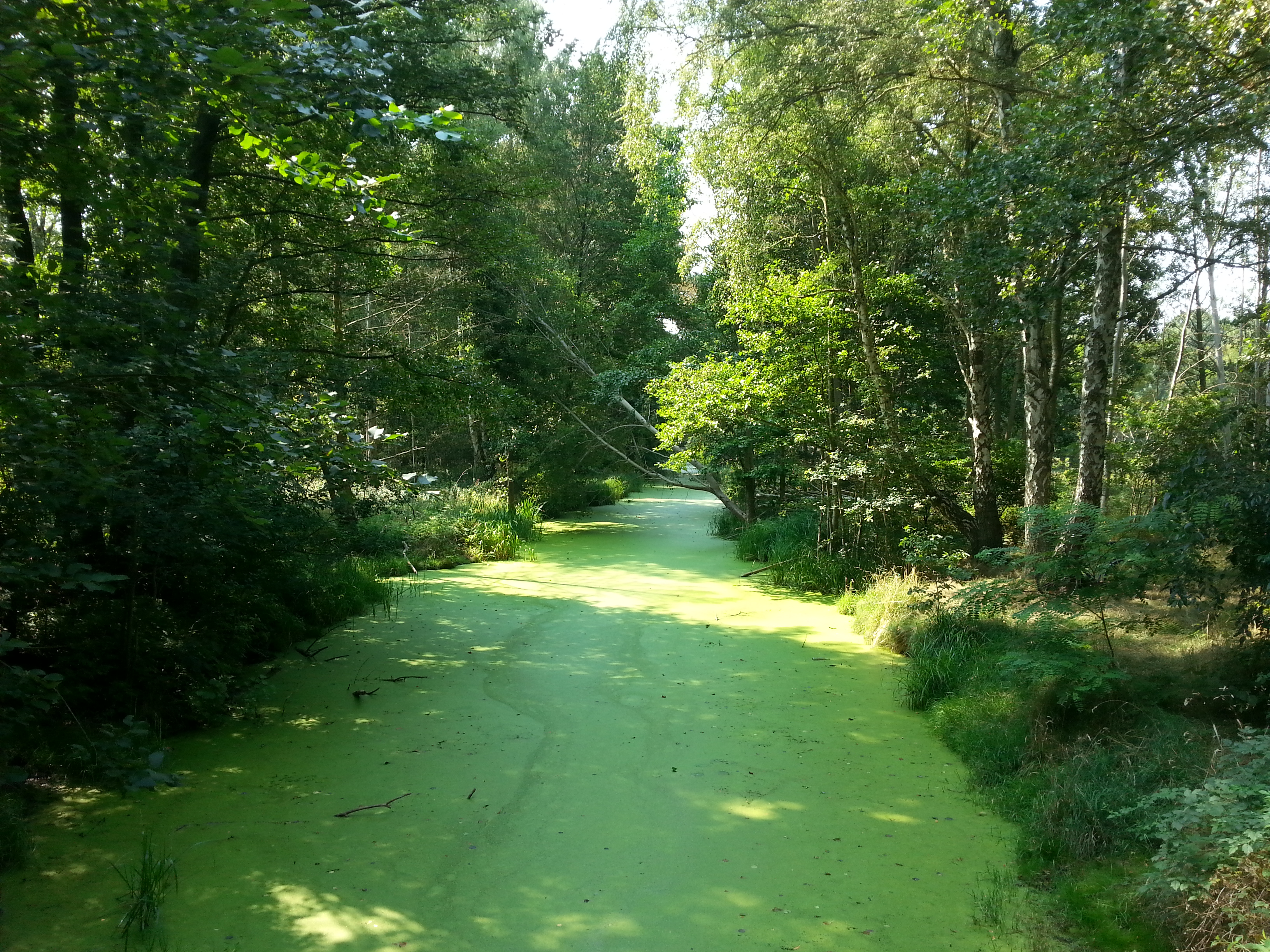 Der Skabyer Torfgraben zwischen Bindow und Kablow